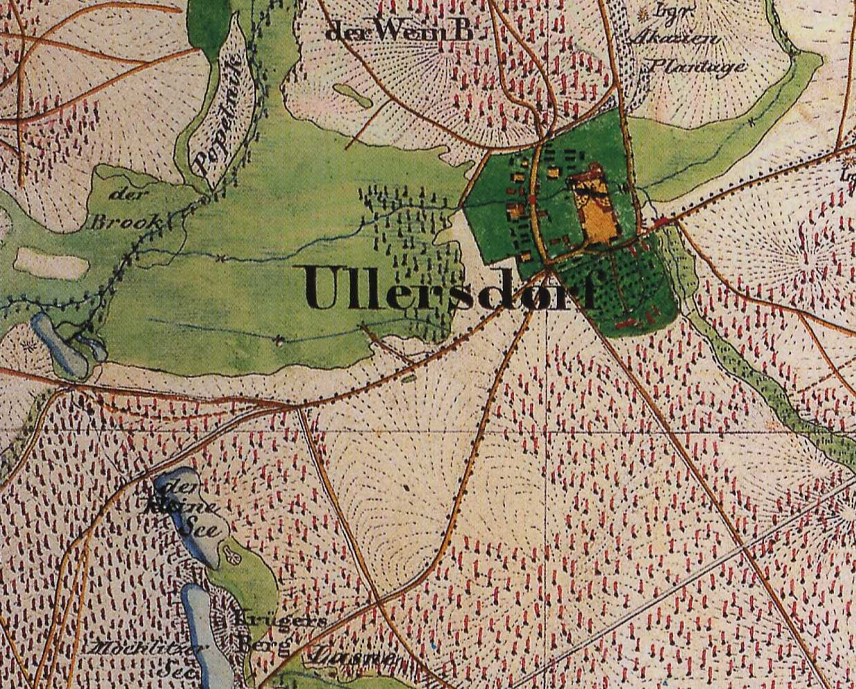 Ullersdorf, Ortsteil der Gemeinde Jamlitz, Landkreis Dahme-Spreewald, Brandenburg, Deutschland, Ausschnitt aus dem Urmesstischblatt 3952 Groß Muckrow von 1844